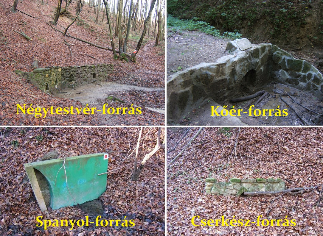 Kaposvár város területén hét kiépített forrás található, ezek közül négy van a képen: a Négytestvér-forrás, a Kőér-forrás, a Spanyol-forrás és a Cserkész-forrás